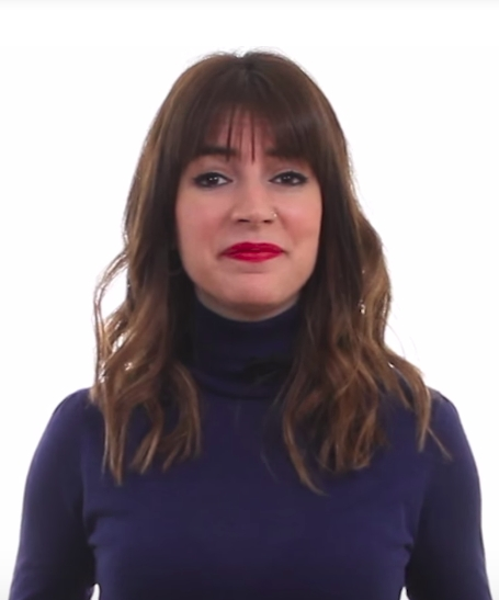 Rita Bosaho nos explica en que consiste la iniciativa presentada en el Congreso